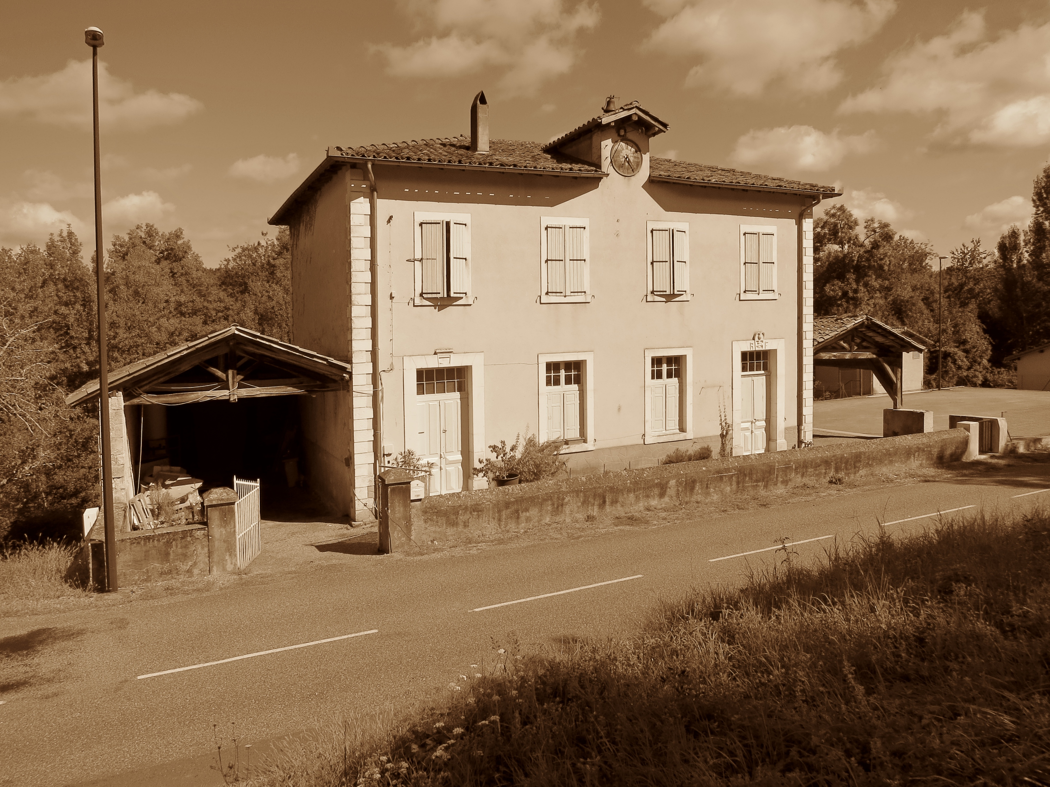 Mérigon (Ariège, Midi-Pyrénées, France) - Ancienne école.